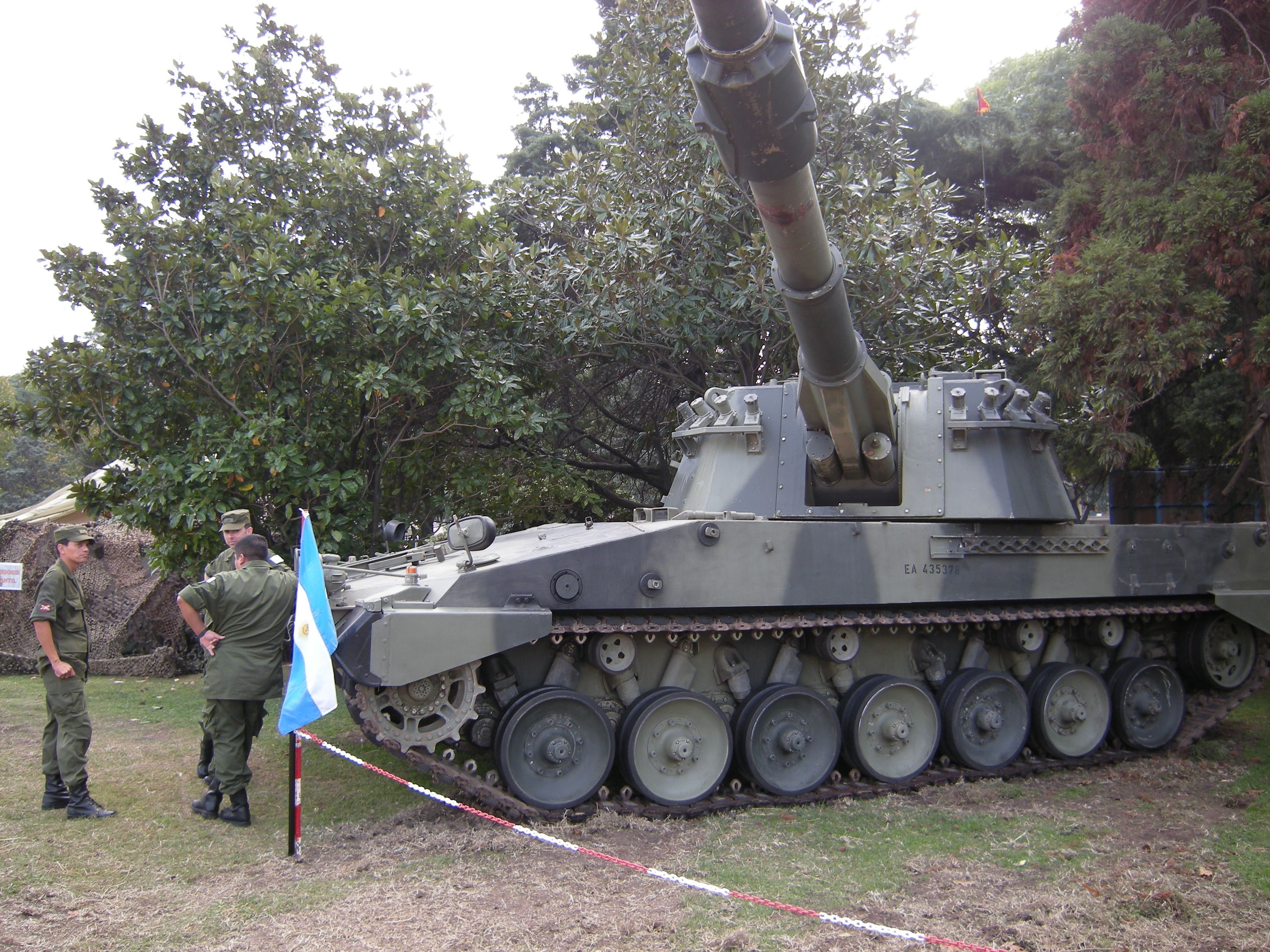 Pieza de artillería autopropulsada VCA Palmaria de 155 mm, durante la Exposición del Ejército Argentino realizada en mayo de 2008